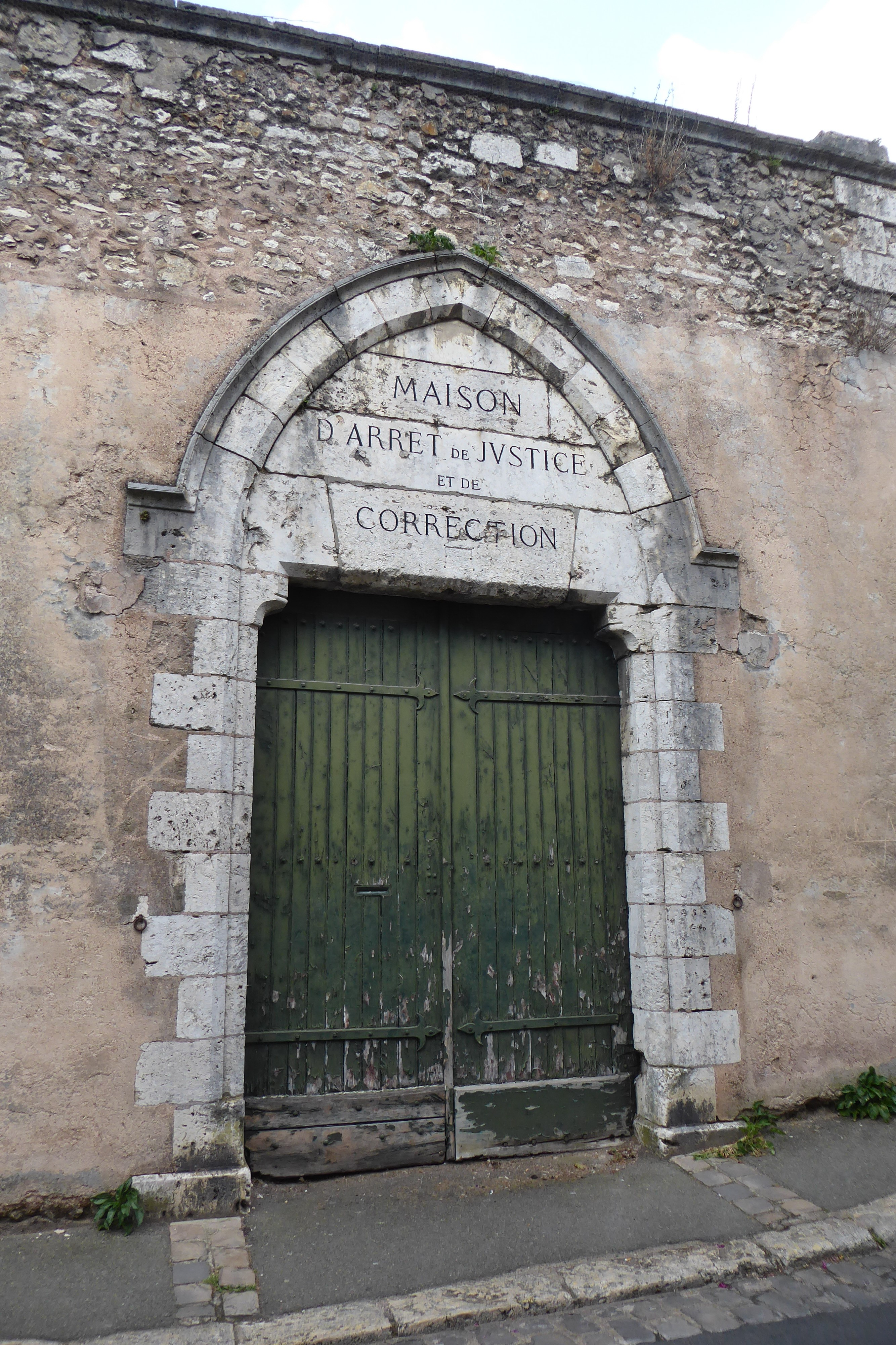 "maison d'arrêt de justice et de correction", rue des Lisses, Chartres, Eure-et-Loir, France.